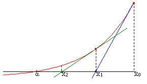 La méthode de Newton illustrée. Image obtenue par logiciel Maple.